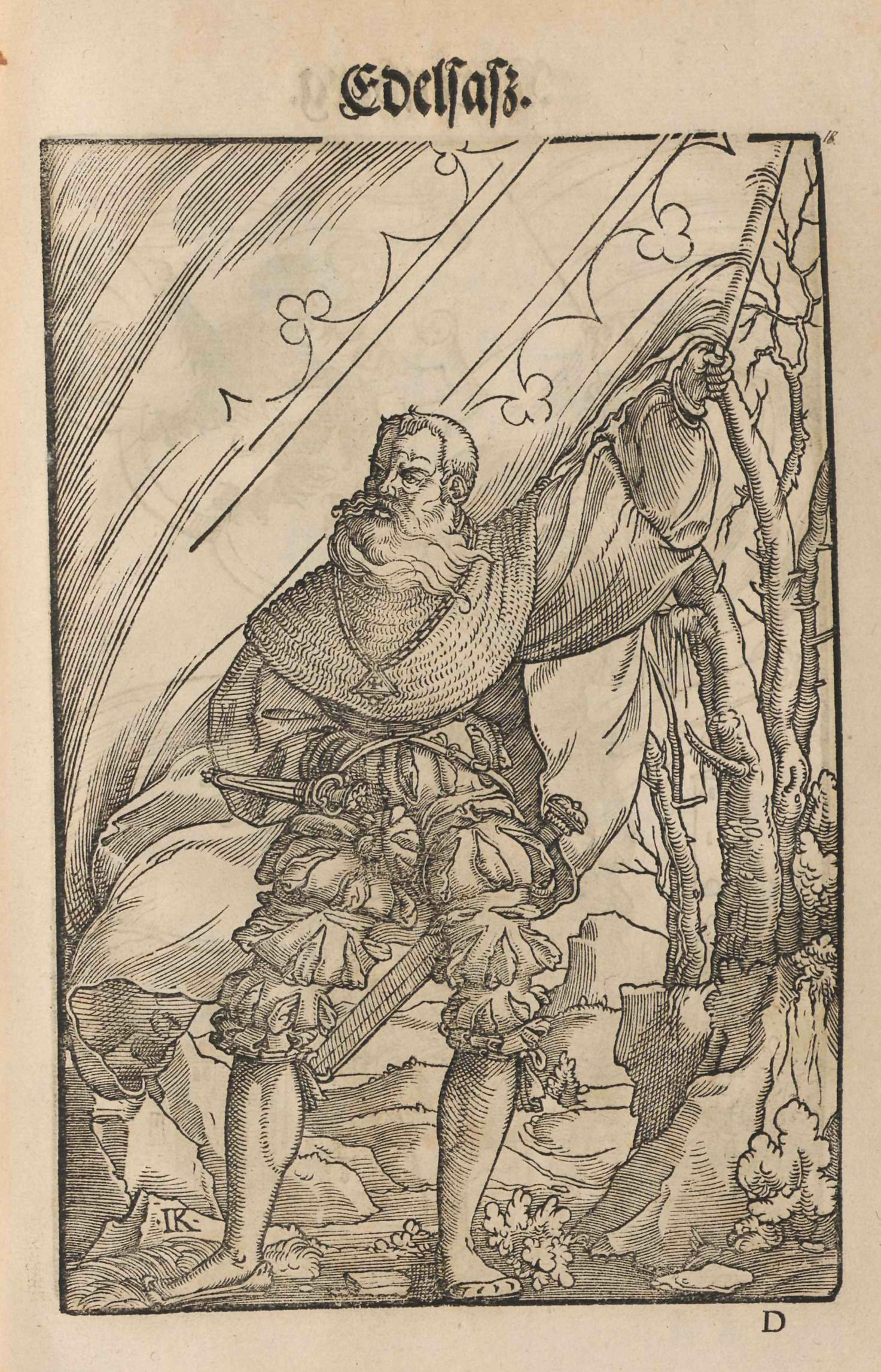 Jacob Koebel (Vorrede): Wapen. Des Heyligen Römischen Reichs Teutscher nation. Gedruckt bei Cyriacus Jacob (evtl. auch Herausgeber/Autor), Frankfurt am Main 1545, Holzschnitte von Jacob Kallenberg. Zu Angaben zur Tingierung (Farbgebung) der Wappen siehe das Register ab Bild Nr. 165. Edelsass (Elsaß, Landgrafschaft Niederelsass)